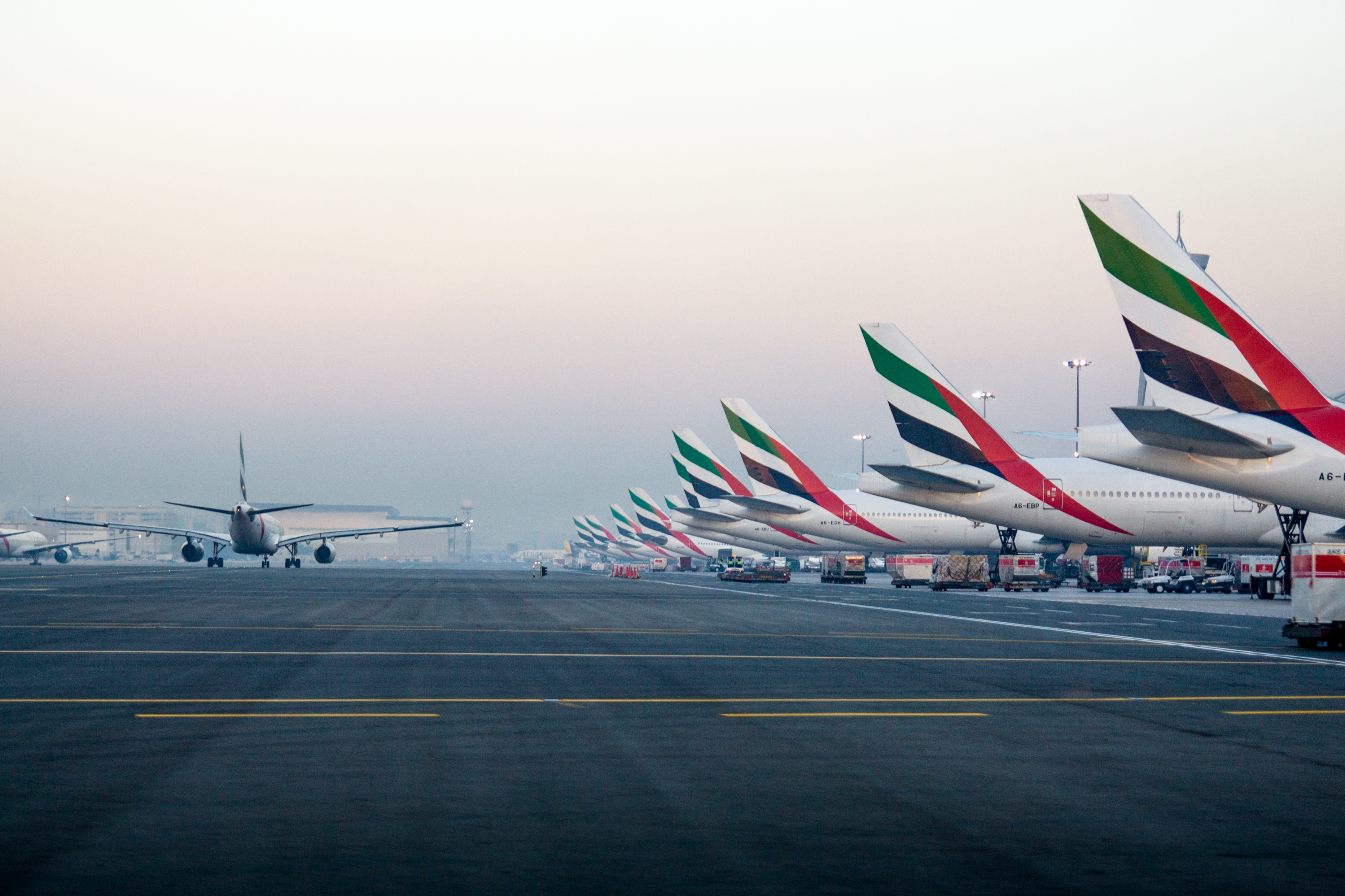 Emirates tails